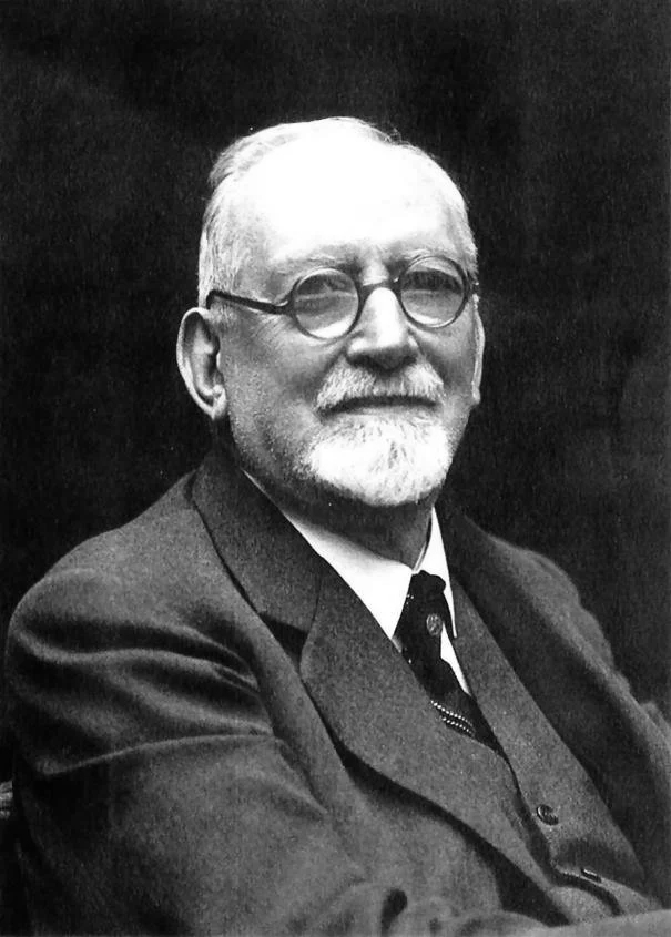 Adolfo Venturi, storico dell'arte (1856-1941)